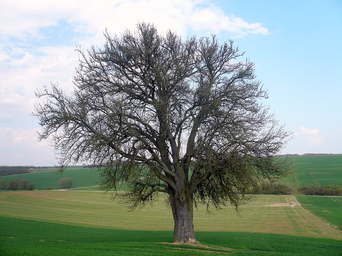 Birnbaum am Lerchenberg